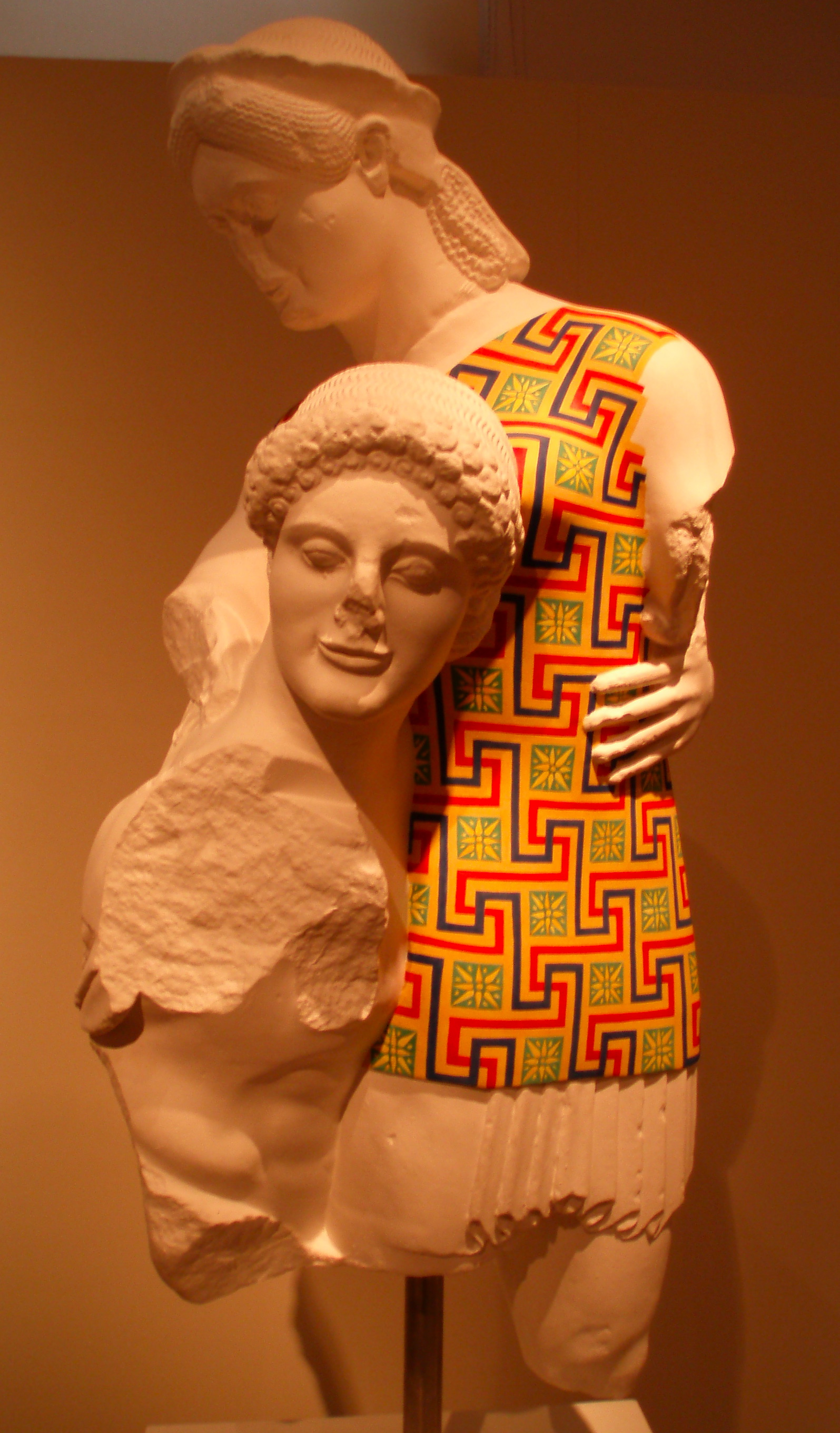 L'enlèvement d'Antiope par Thésée. Groupe sculpté du fronton ouest du temple d'Apollon-Daphnephoros à Érétrie, appartenant à une amazonomachie. Étude : Vinzenz Brinkmann. Moulage de plâtre : H. Scharpf. Peinture : Ulrike Koch-Brinkmann. Original : Musée archéologique d'Érétrie.